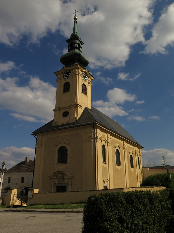 Kostel svatého Jana Nepomuckého, náměstí, Omlenička.